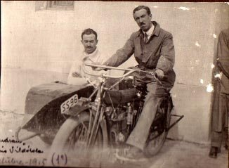 Ejemplo de side-car Indian